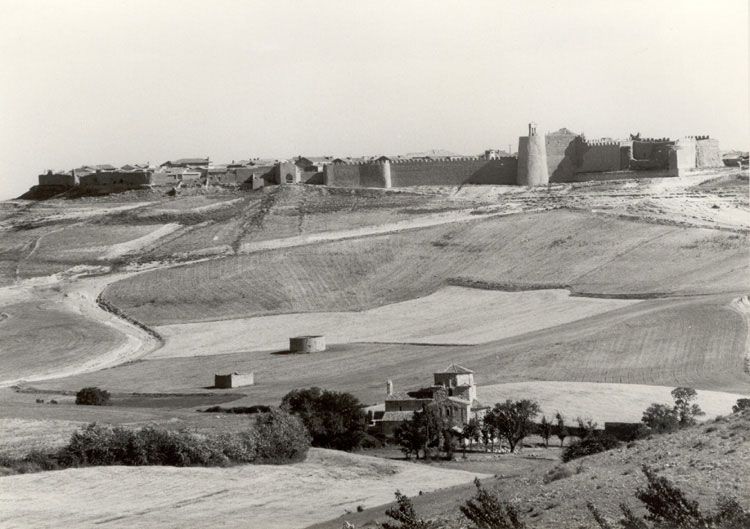 Murallas y Castillo. Panorámica - Urueña (Valladolid) - Fotografía 128 x 178 Color